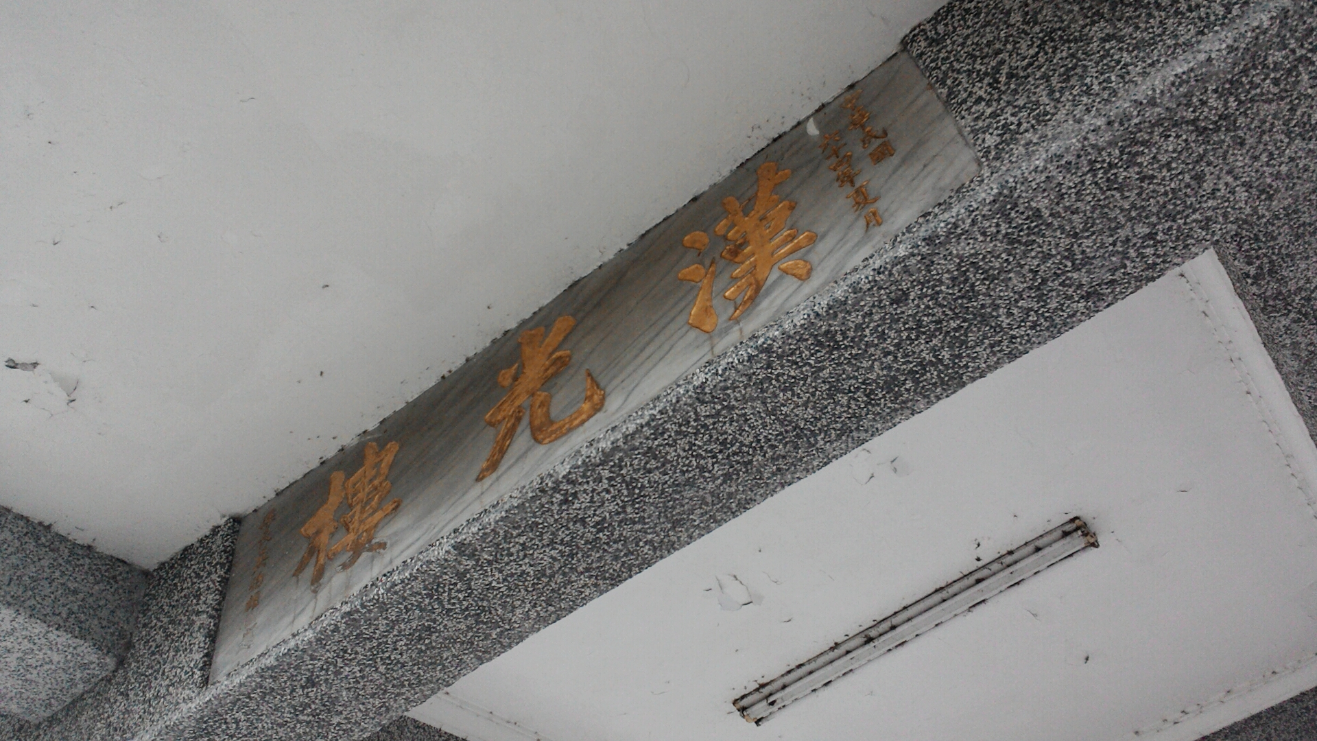 漢光樓桃園縣長吳伯雄所題匾額,桃園市大溪區福仁里